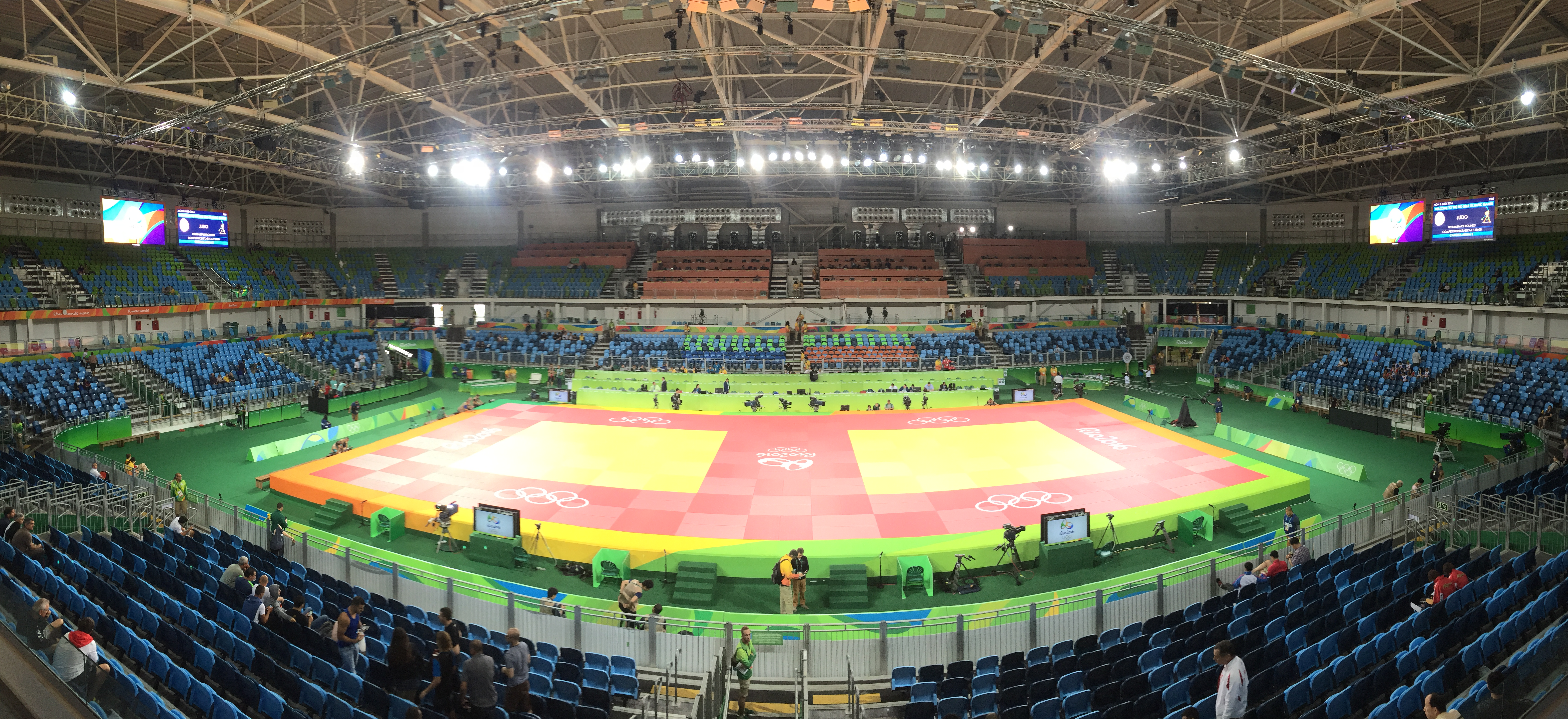 Dia em que a nossa atleta Rafaela Silva ganhou o ouro!